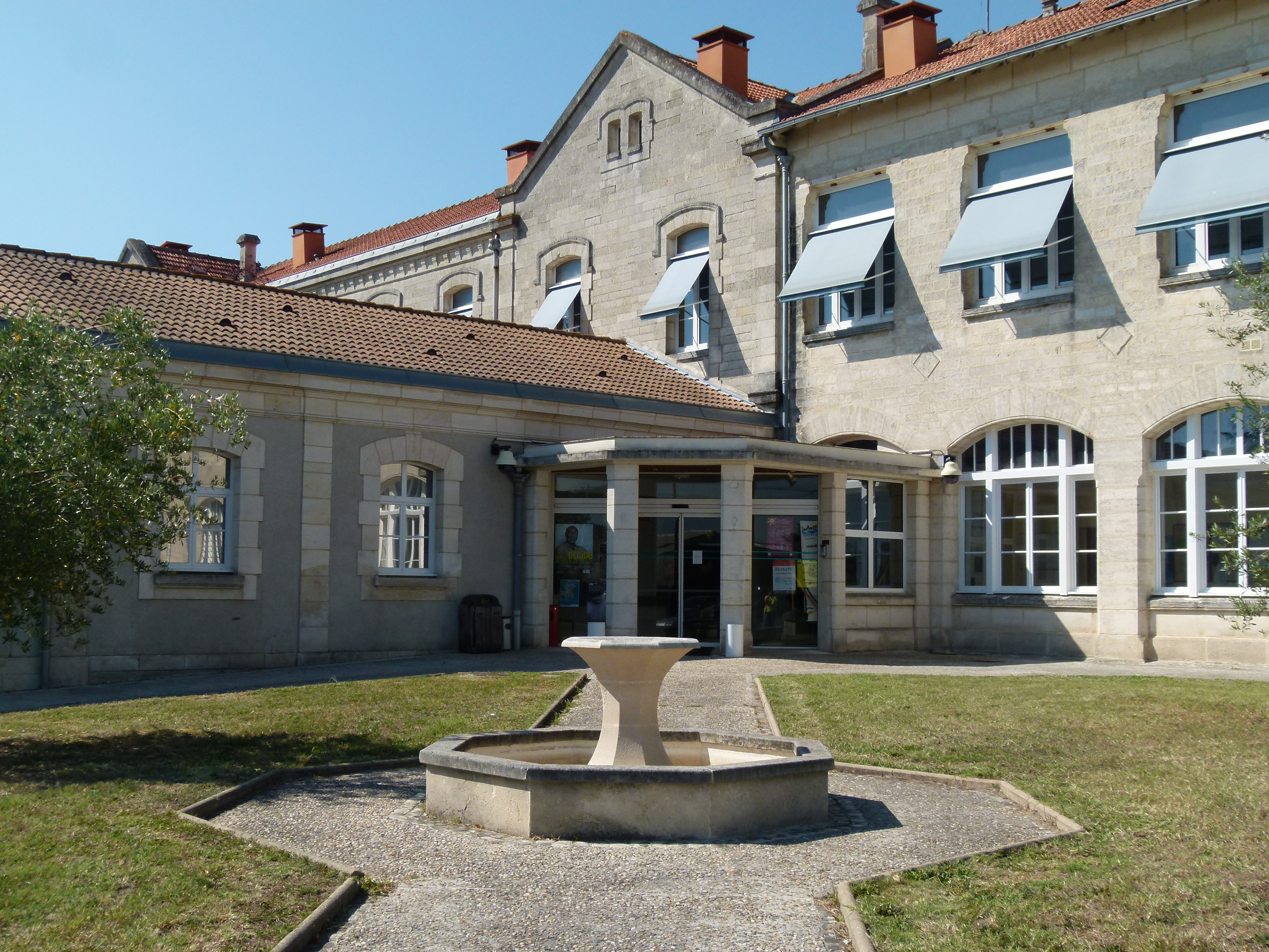 L'Hôpital de Marennes en Charente-Maritime est maintenant un centre gériatrique (foyer-logement pour personnes âgées, structure EHPAD).